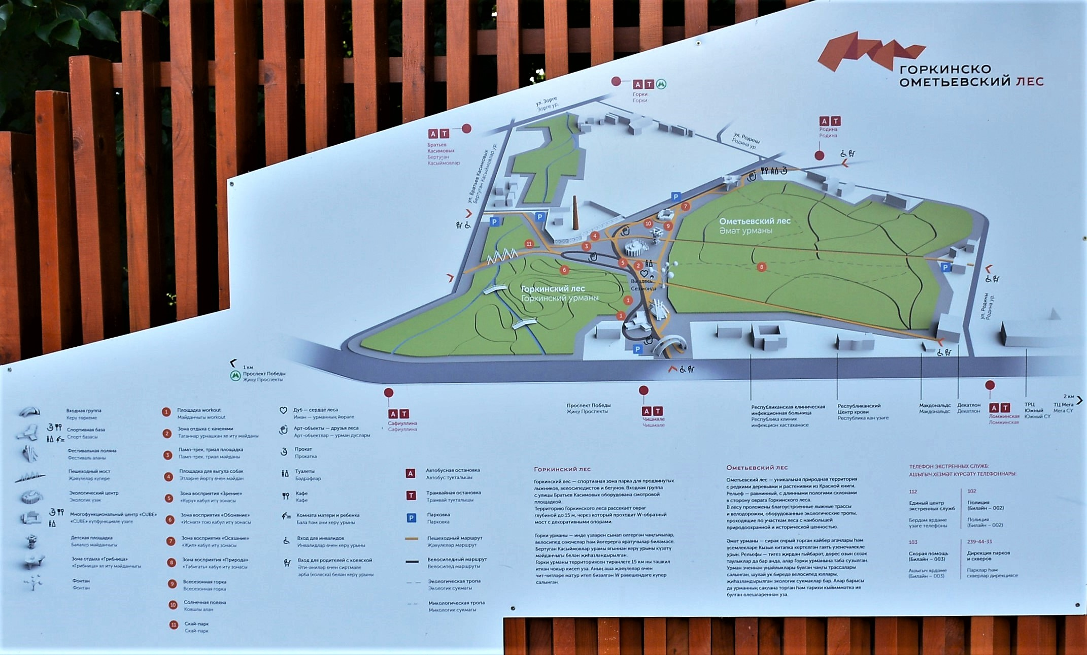 Казань. Парк "Горкинско-Ометьевский лес": схема